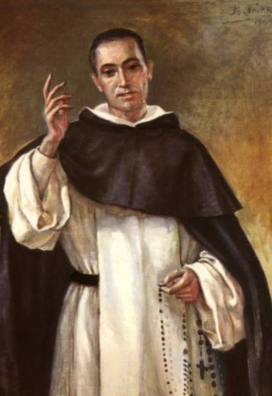 Retrat de Sant Francesc Coll, per Blanca Chavarri